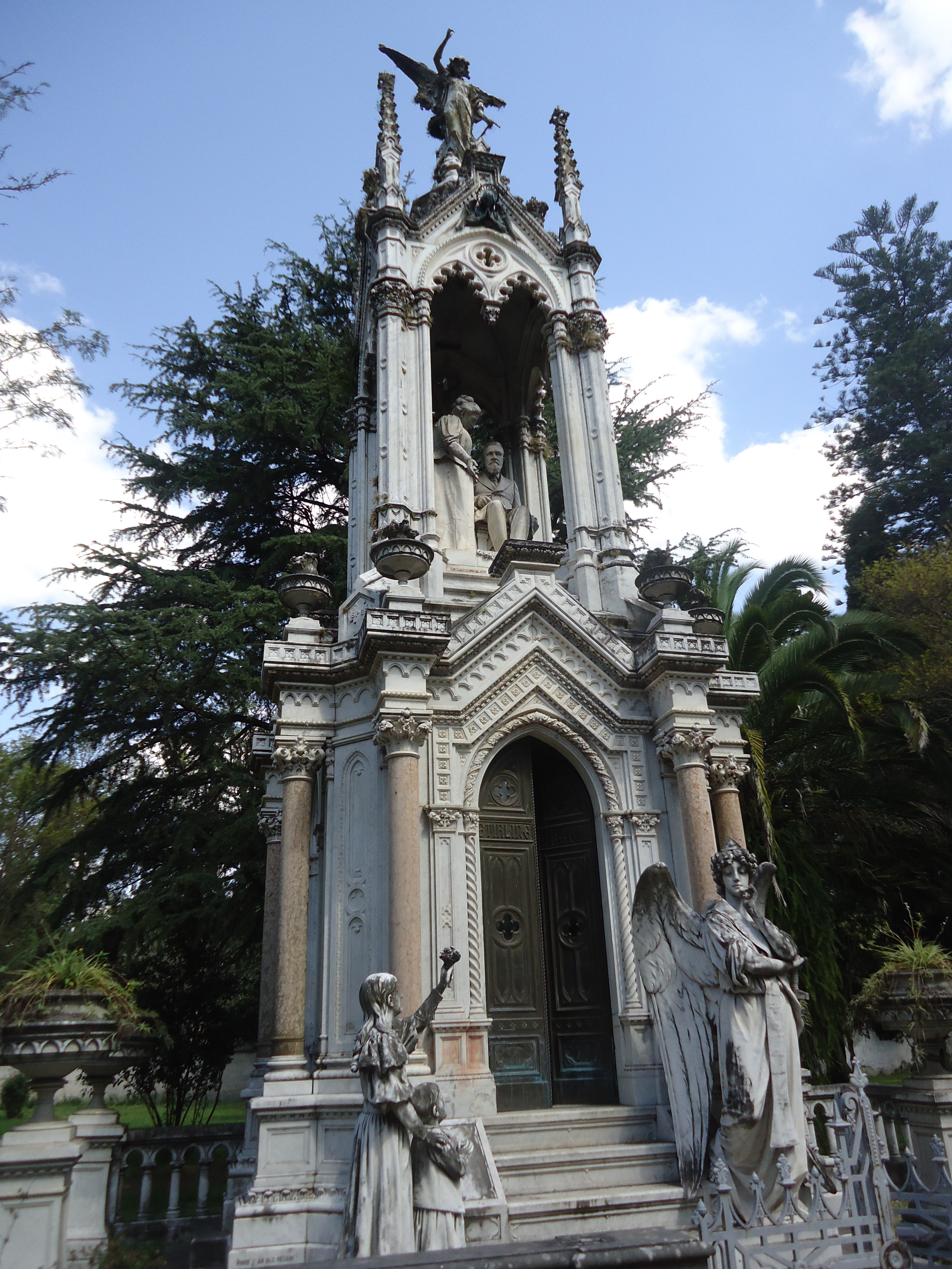 Monumento a Perpetuidad o Cementerio Viejo. Ubicada en el departamento de Paysandú